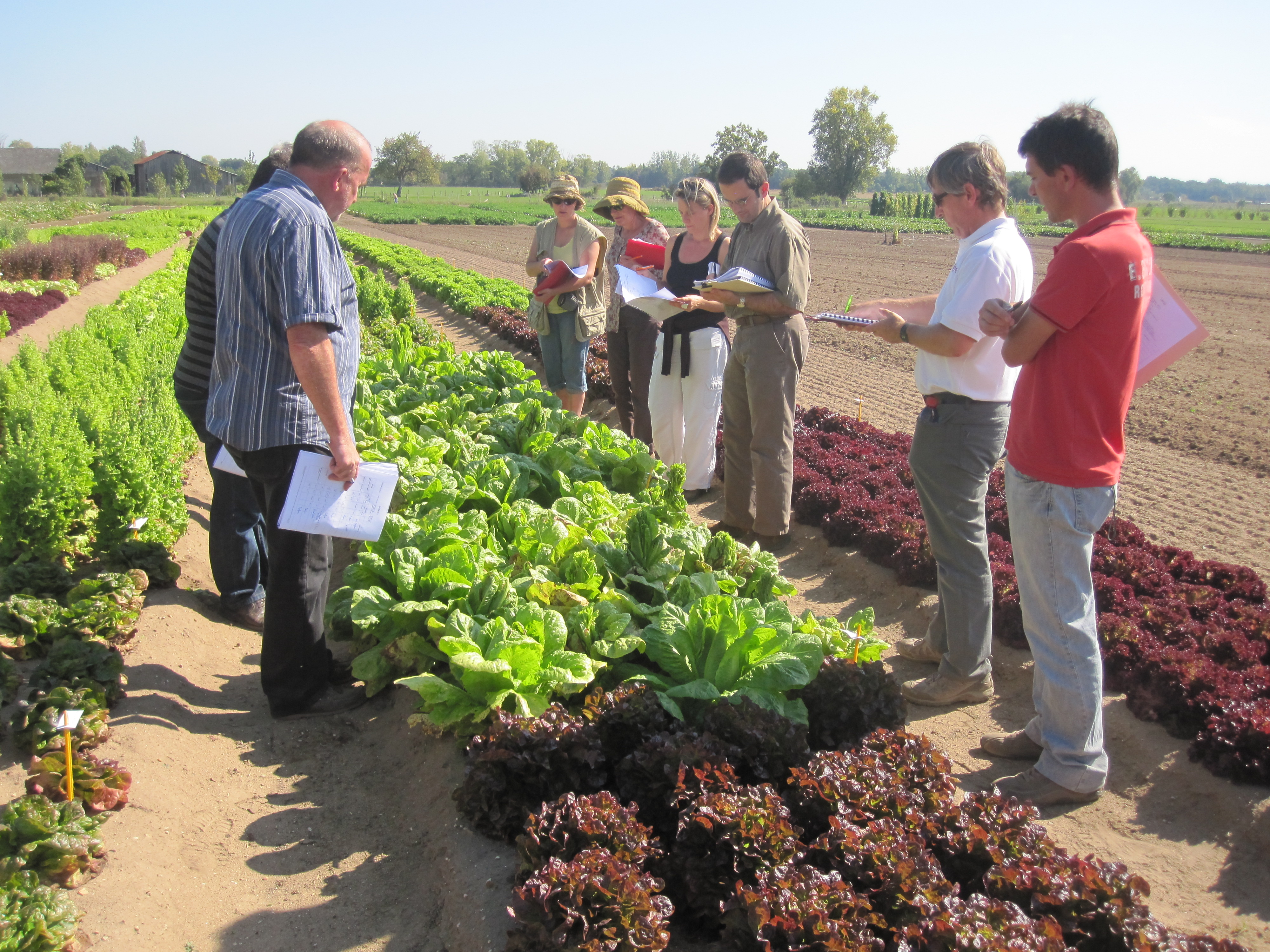 Examen de variétés de laitues Geves Brion